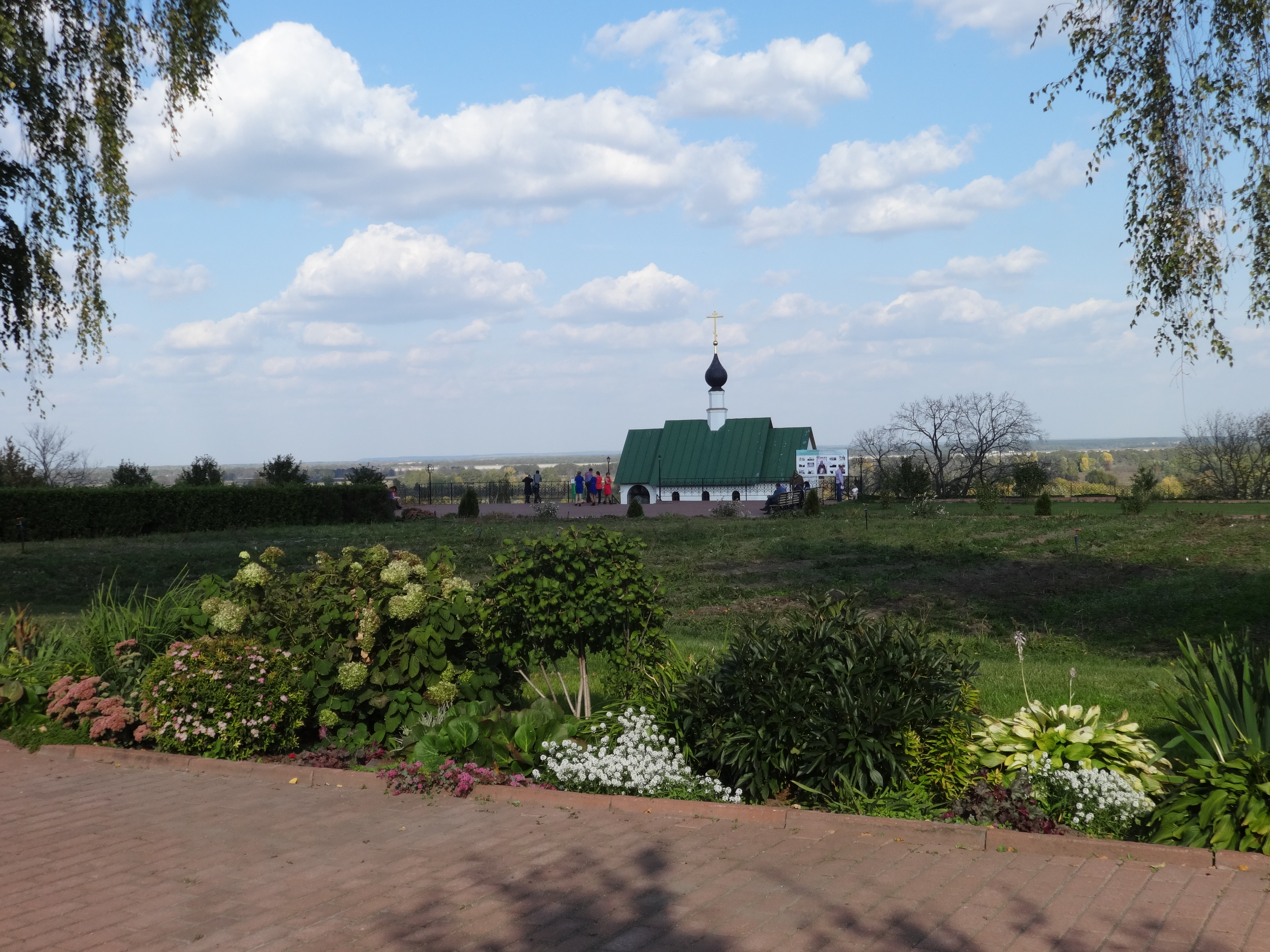 Ансамбль Преображенского монастыря (Владимирская область, Муром, улица Лакина, 1)